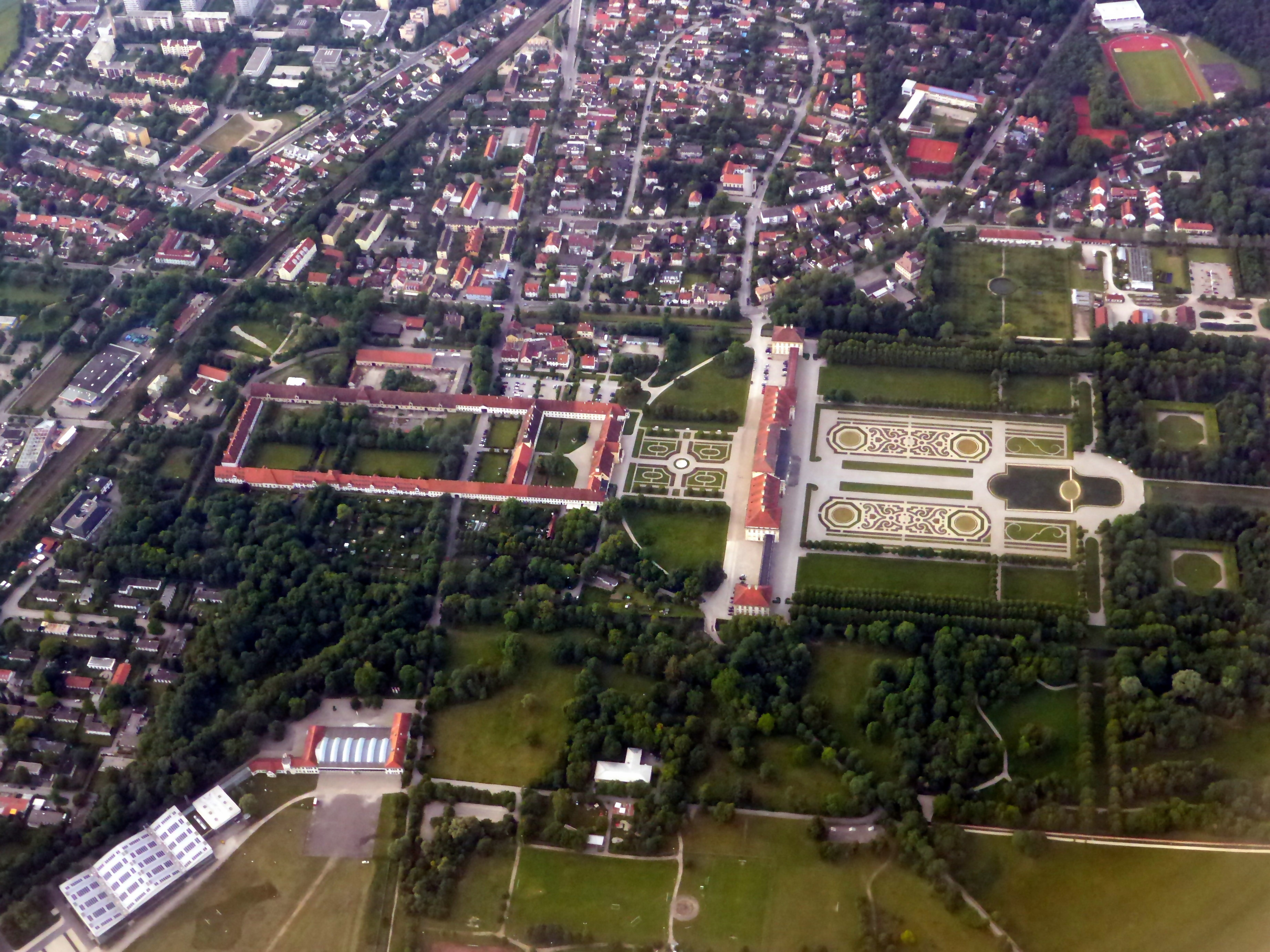 Oberschleißheim mit Schloss Schleißheim.